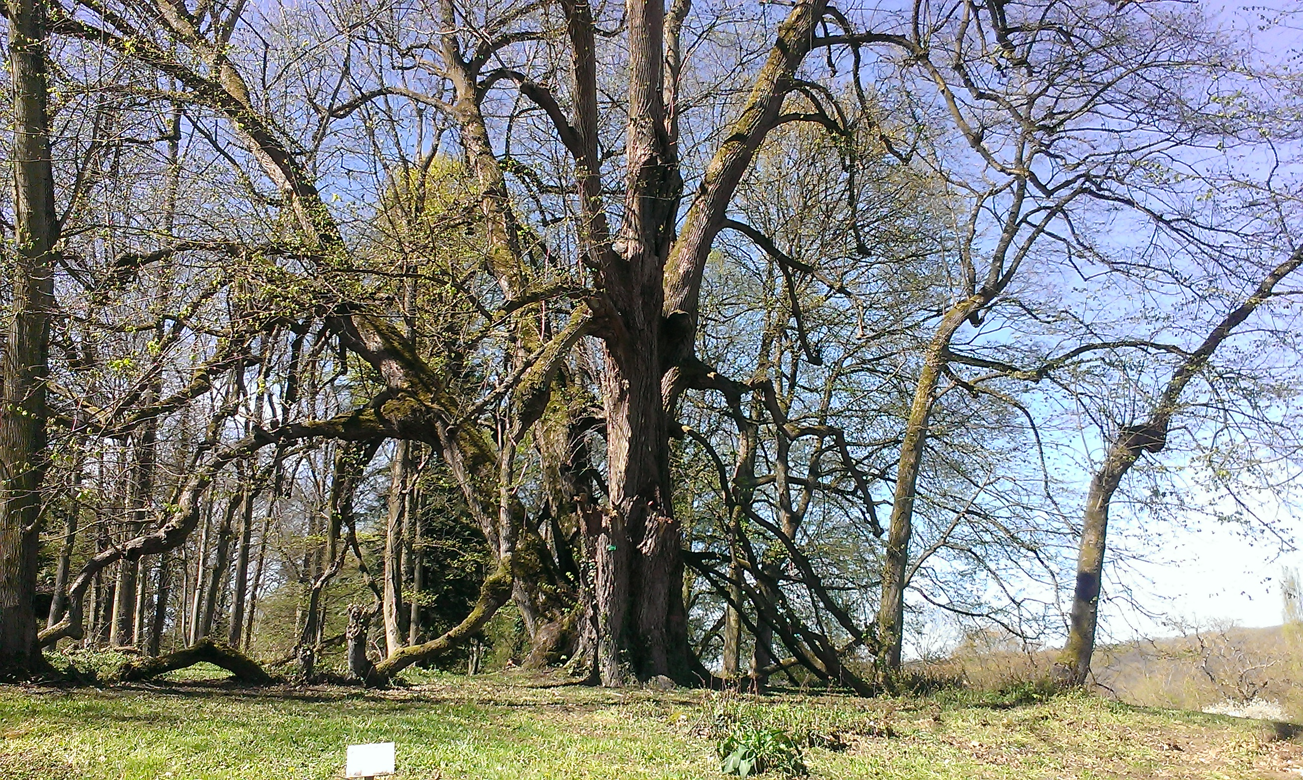 Tilleul remarquable, Désert de Retz à Chambourcy (78)